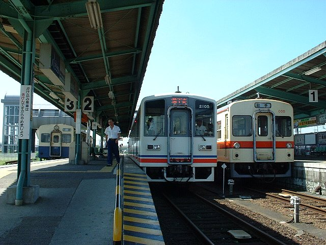 関東鉄道常総線 水海道駅 3車種が勢揃いした構内 左からキハ100形、キハ2100形、キハ0形